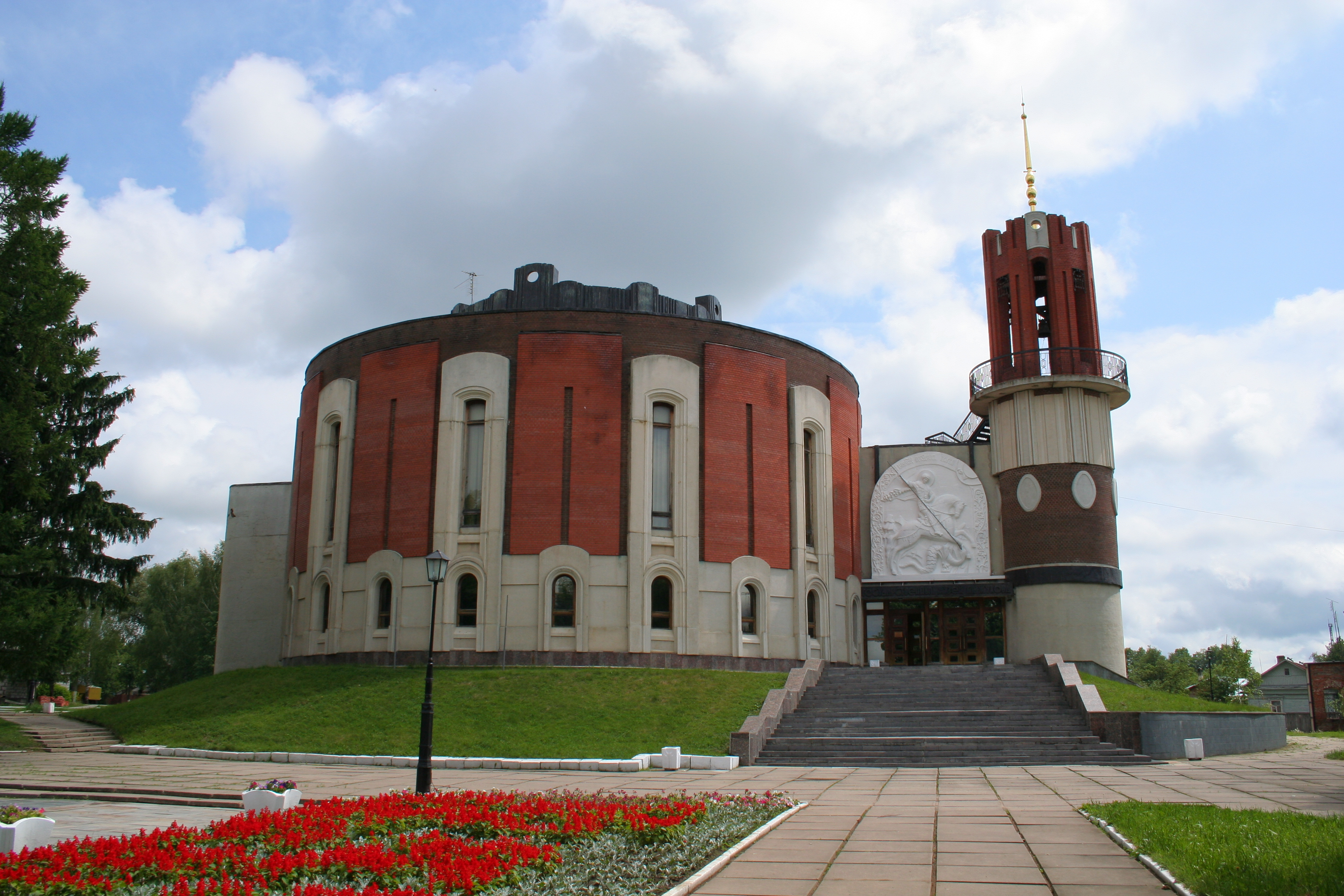 Stadt Schukow, Oblast Kaluga, Russland. Memorial zu Ehren von Marschall Schukow. Museumsgebäude.